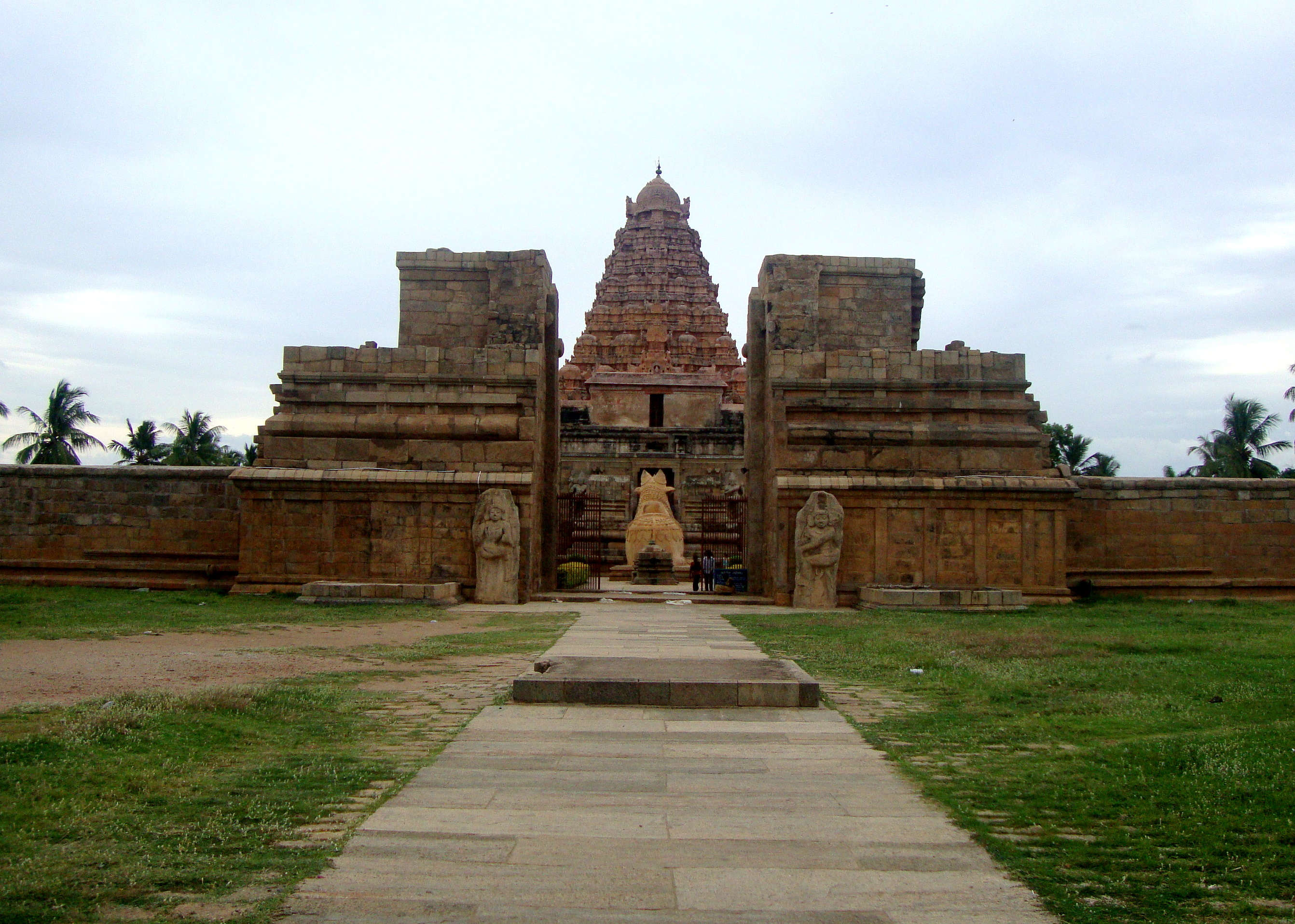 Gangaikonda Cholapuram Temple Front View.